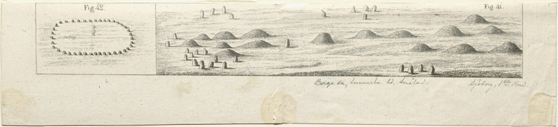 Raä-nr: Berga 151:1 och Berga 152:1. Gravhögar och skeppsättning/stenkrets.Teckning i Nils Henrik Sjöborgs Samlingar för Nordens Fornälskare I, pl 12, fig 41 och 42, från 1822. Motiv: Berga 151:1 och Berga 152:1 Kategori: Teckning, Gravfält Raä-nr: Berga 151:1 och Berga 152:1. Gravhögar och skeppsättning/stenkrets.Teckning i Nils Henrik Sjöborgs Samlingar för Nordens Fornälskare I, pl 12, fig 41 och 42, från 1822. Berga 151:1 och Berga 152:1.